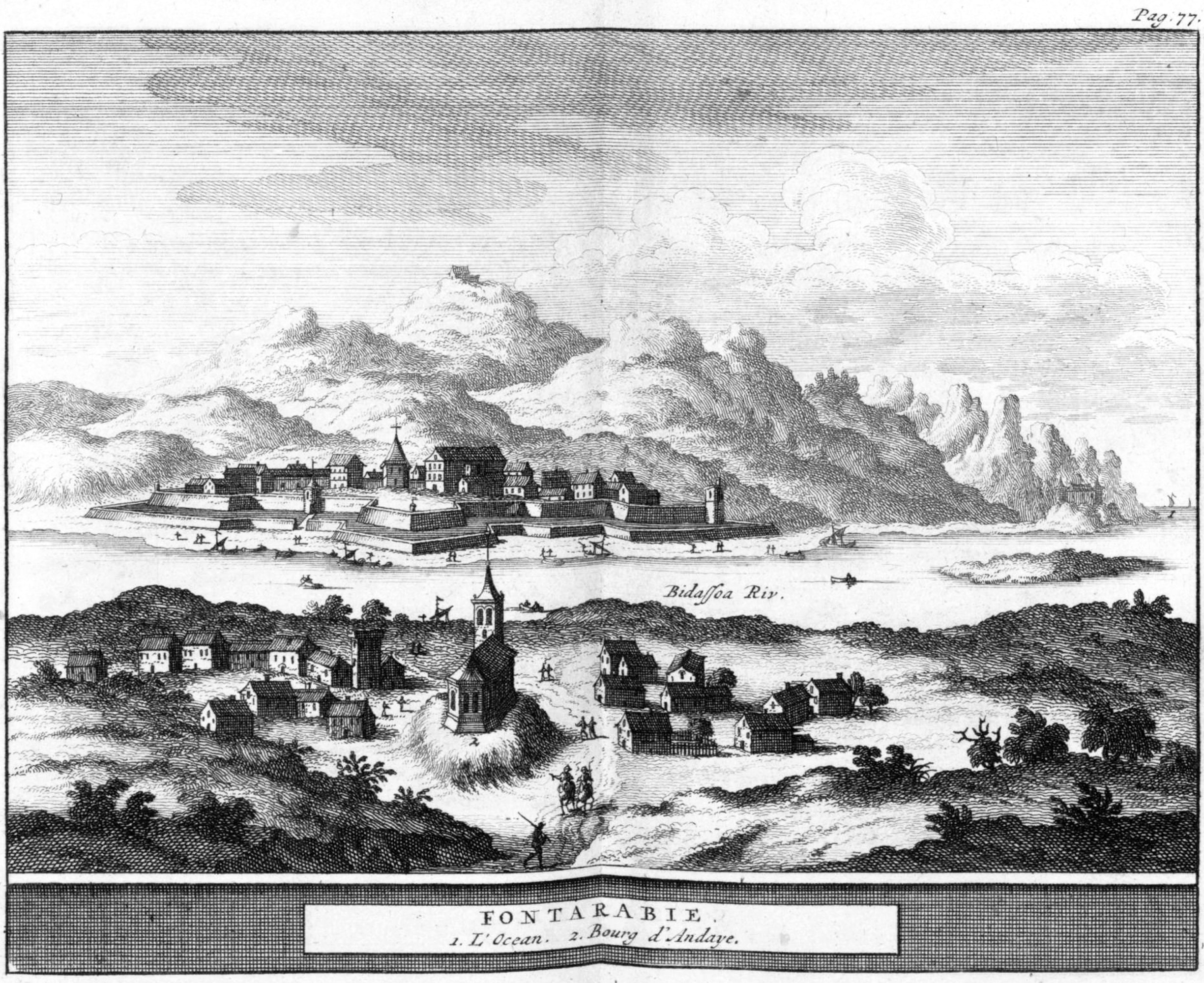 Summary Hondarribia XVIII. mendeko irudi bat.